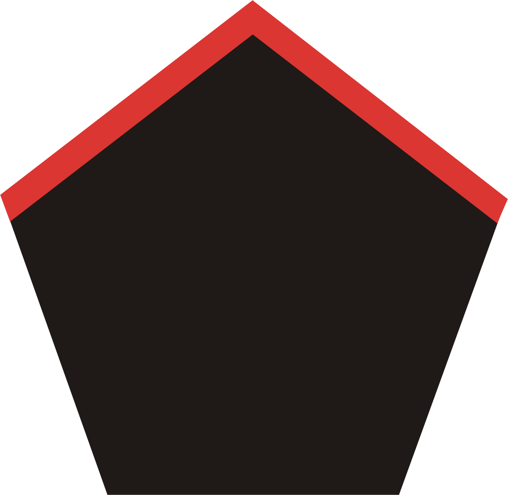 Patka saperów (na kołnierz) wprowadzona w Wojsku Polskim w Anglii w 1941